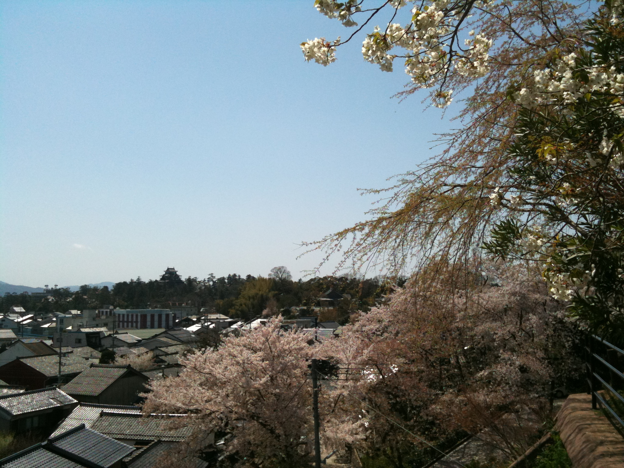 Senju-in Temple in Matsue, Japan - 松江市の千手院 View on Matsue Castle